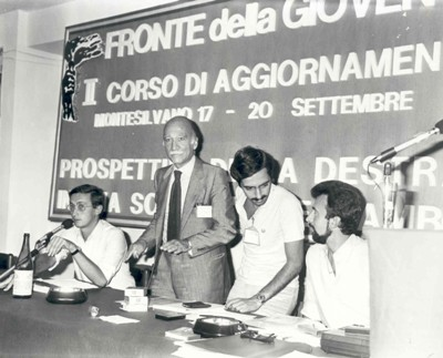 Il segretario del MSI Giorgio Almirante, al corso di aggiornamento del FdG di Montesilvano trai Gianfranco Fini (a sinistra) e Maurizio Gasparri nel settembre 1981. A destra, a colloquio con Gasparri, Almerigo Grilz